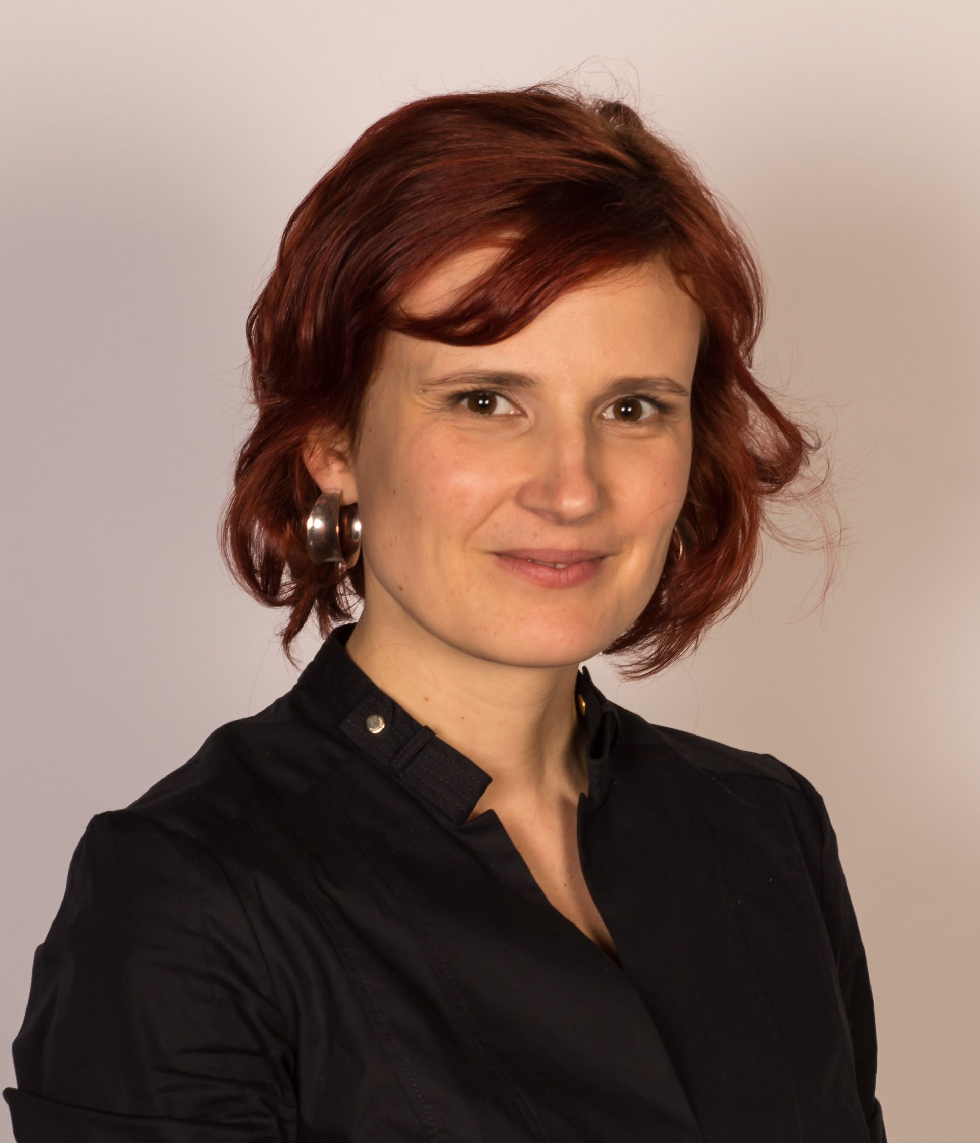 Bundesparteitag DIE LINKE Mai 2014 in Berlin, Velodrom, Mitglied des Parteivorstandes 2014 - 2016